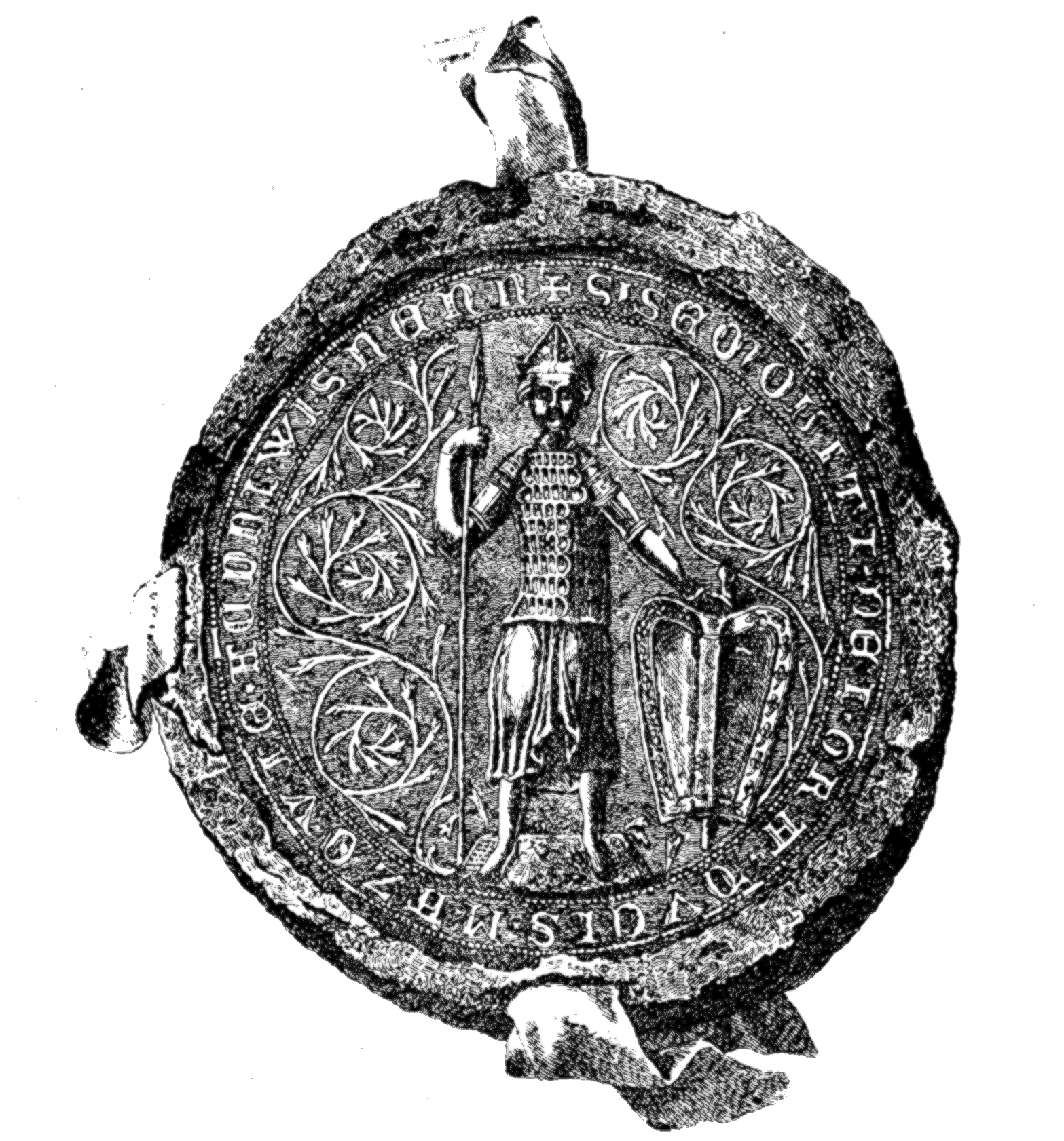 seal of Polish duke Ziemowit II Mazowiecki "+S SEMOVITI DEI GRA DUCIS MAZOVIA AC DNI WISNENN"